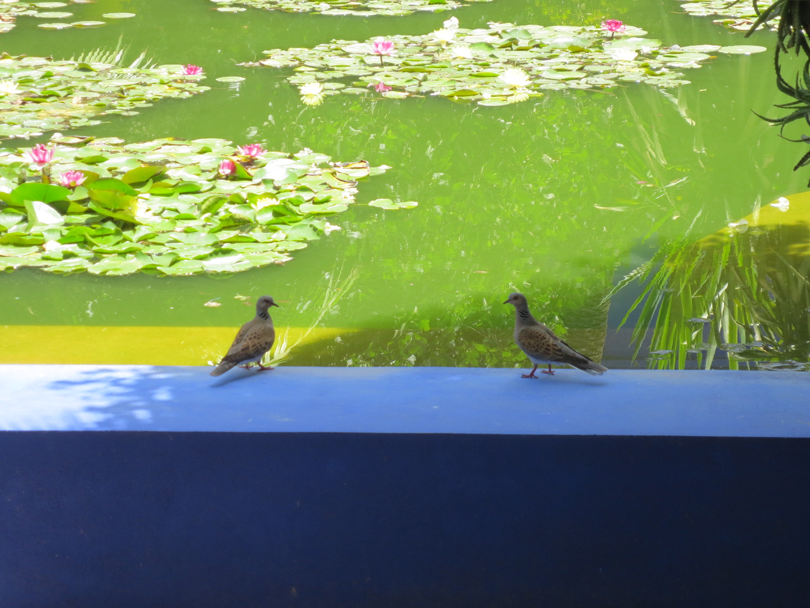 Majorelle Garden